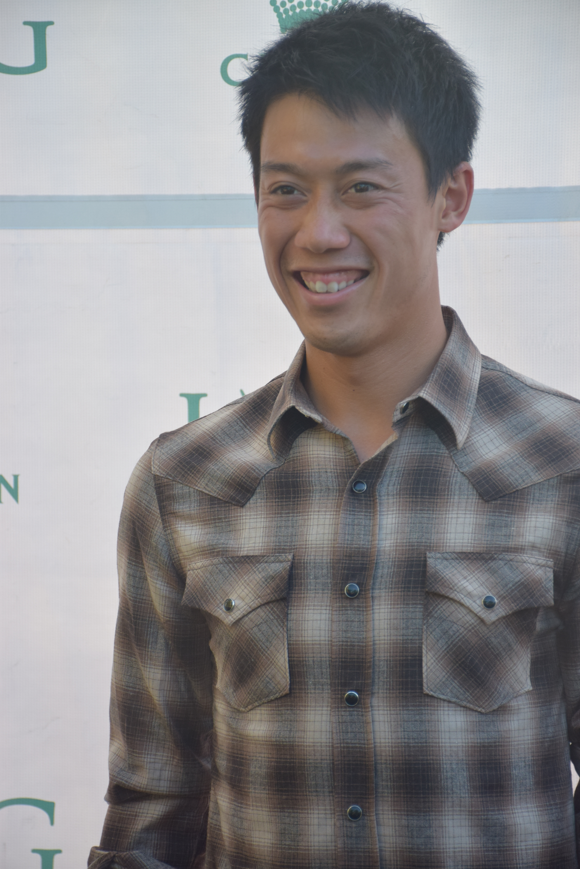 Kei Nishikori (Japan), Australian Open Players' Party